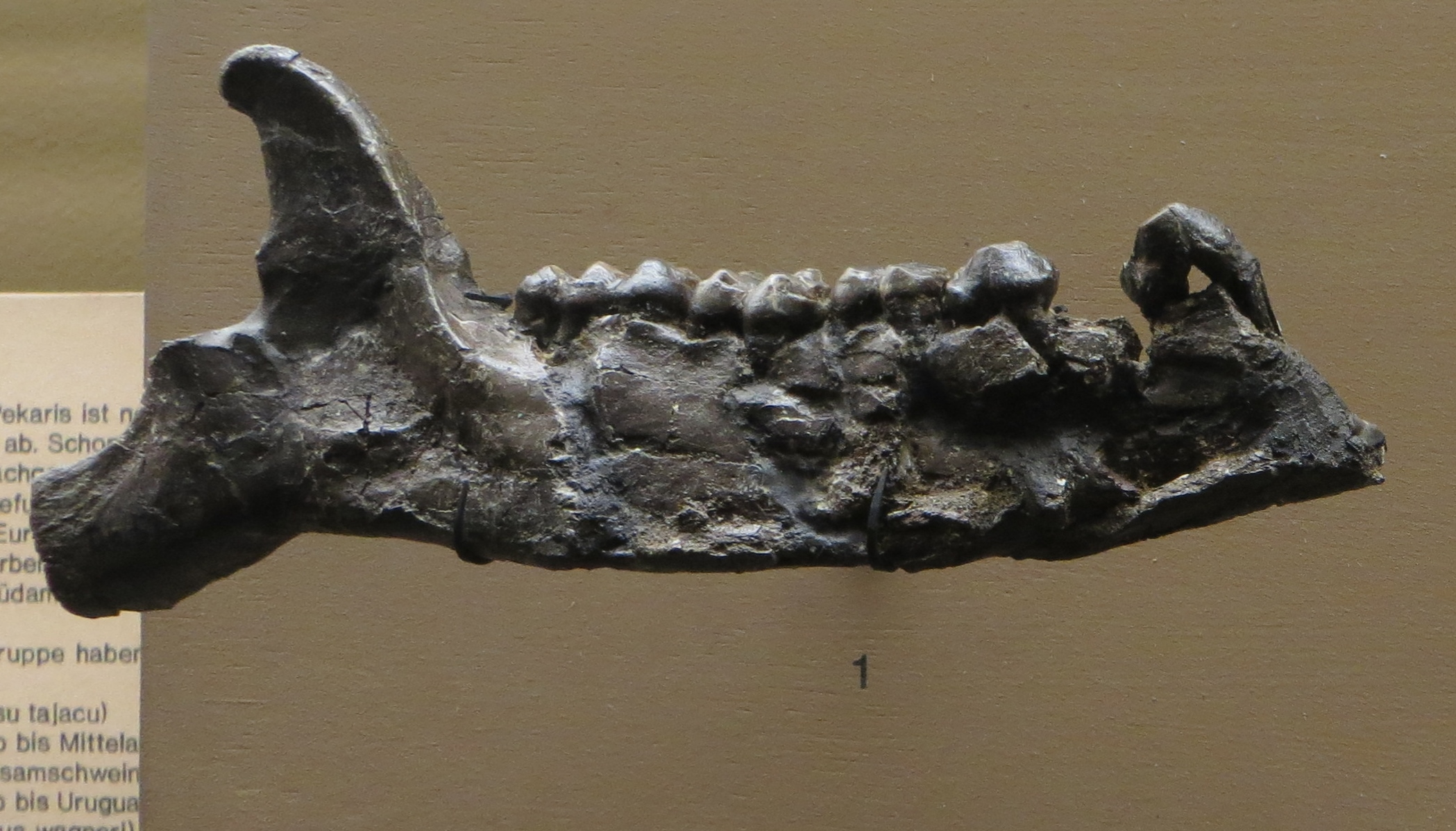 Fossil of Choeropotamus - Took the picture at Natural History Museum, Basel